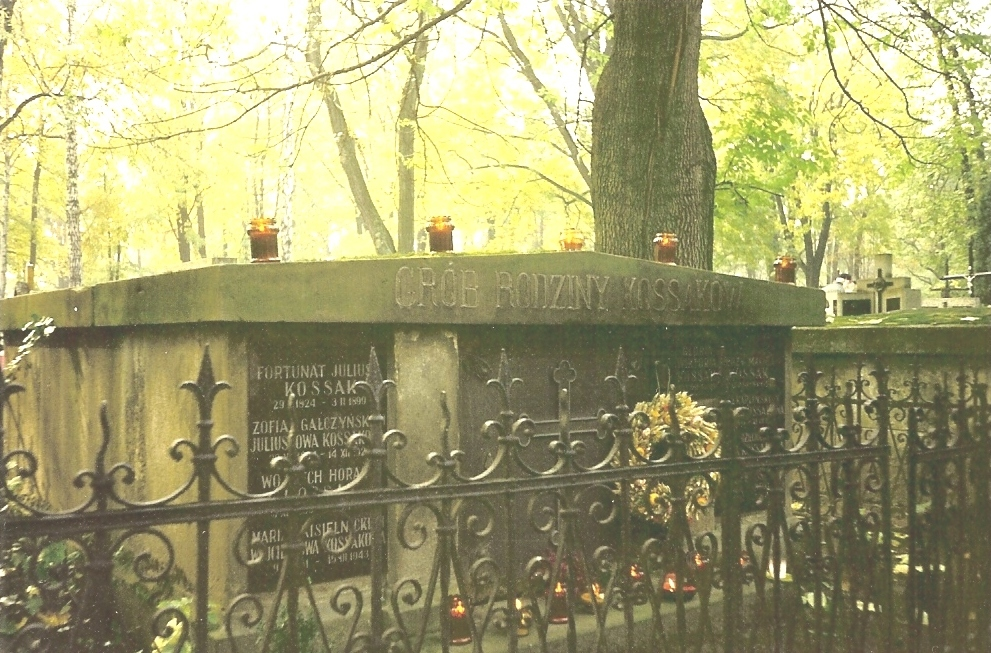 Grobowiec dwukrotnego prezesa TPSP (podczas I i II wojny światowej) Wojciecha Kossaka